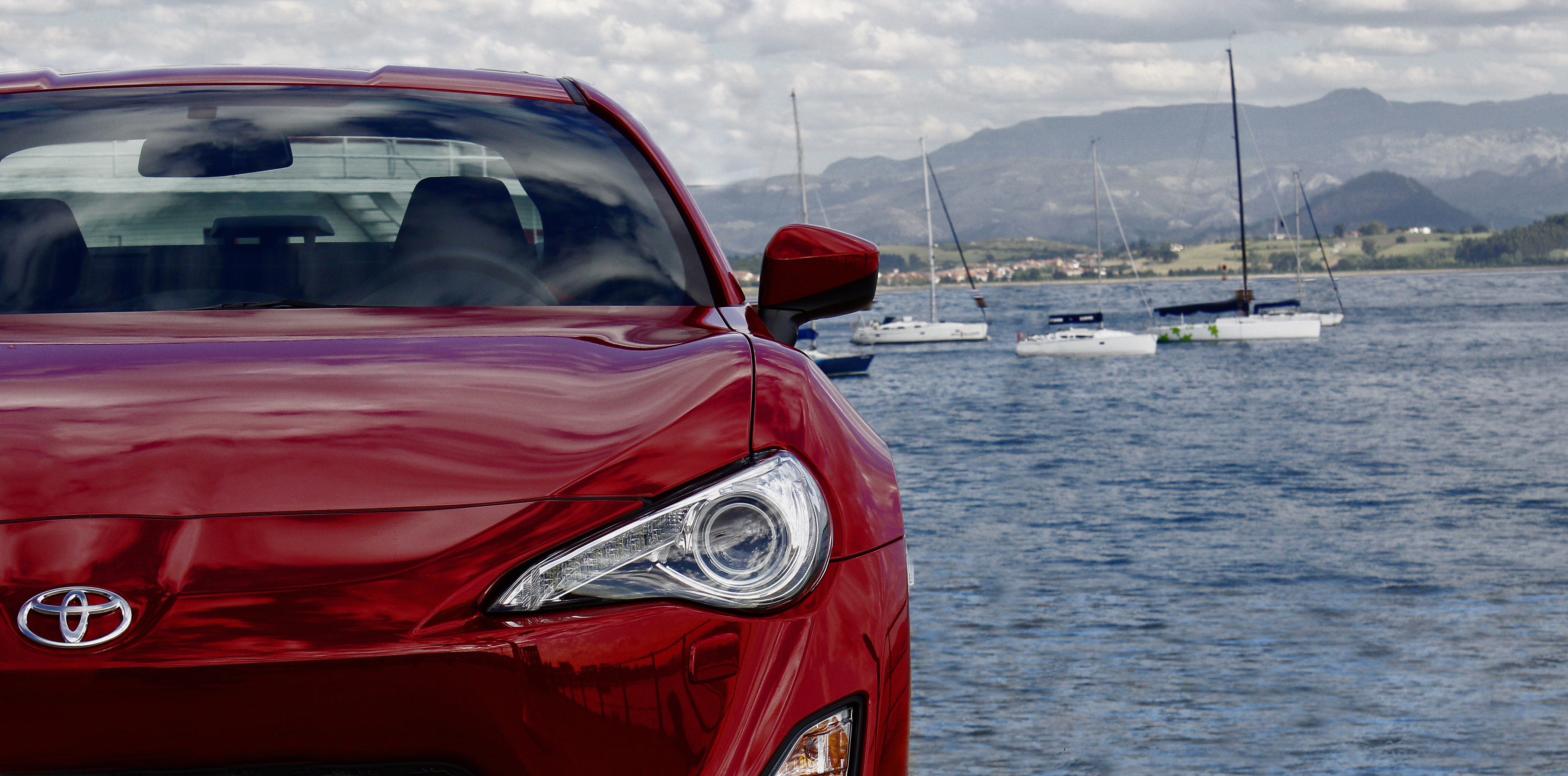 2012 Toyota GT86